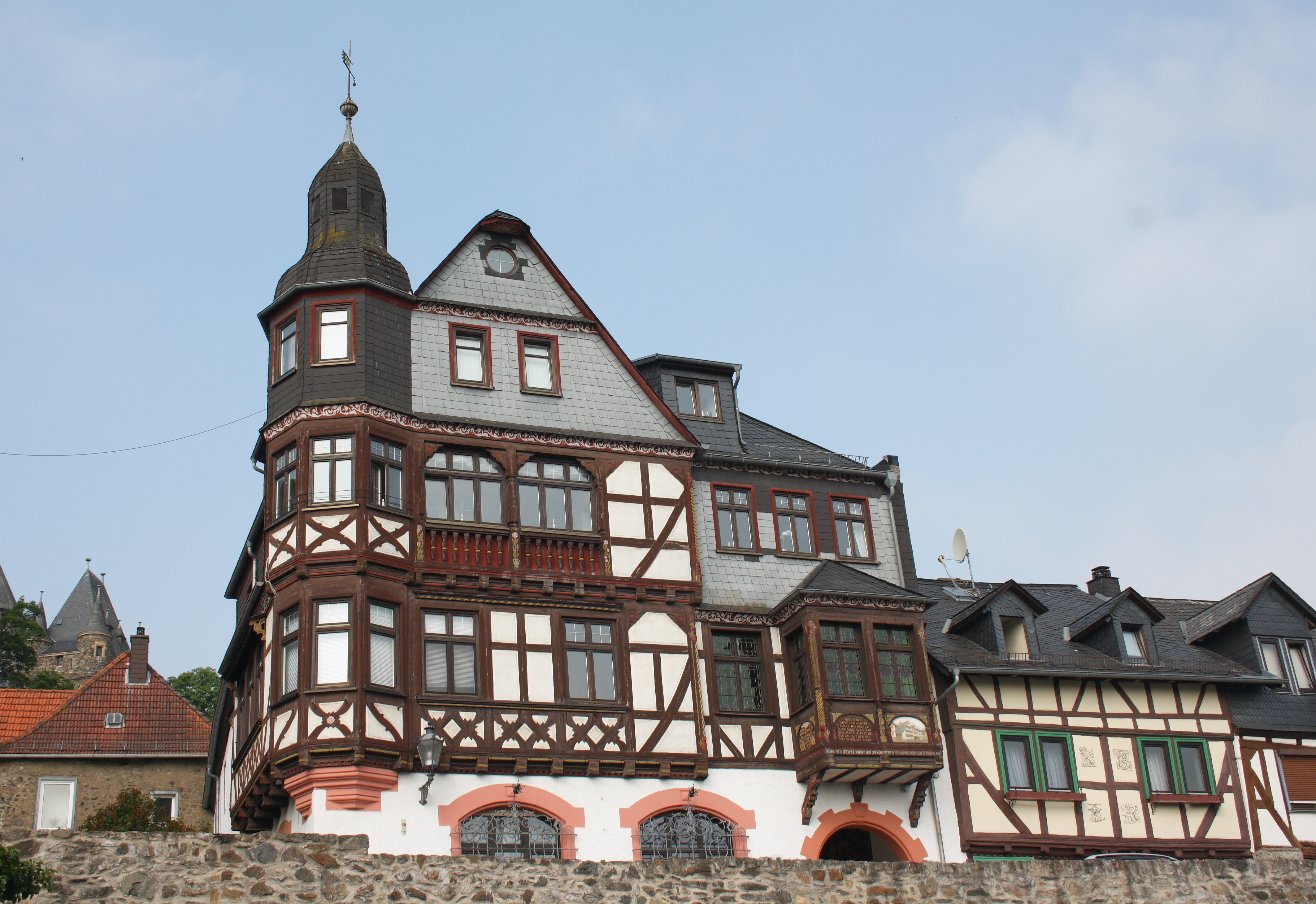 Haus Schütt 5 in Braunfels im Lahn-Dill-Kreis (Hessen)